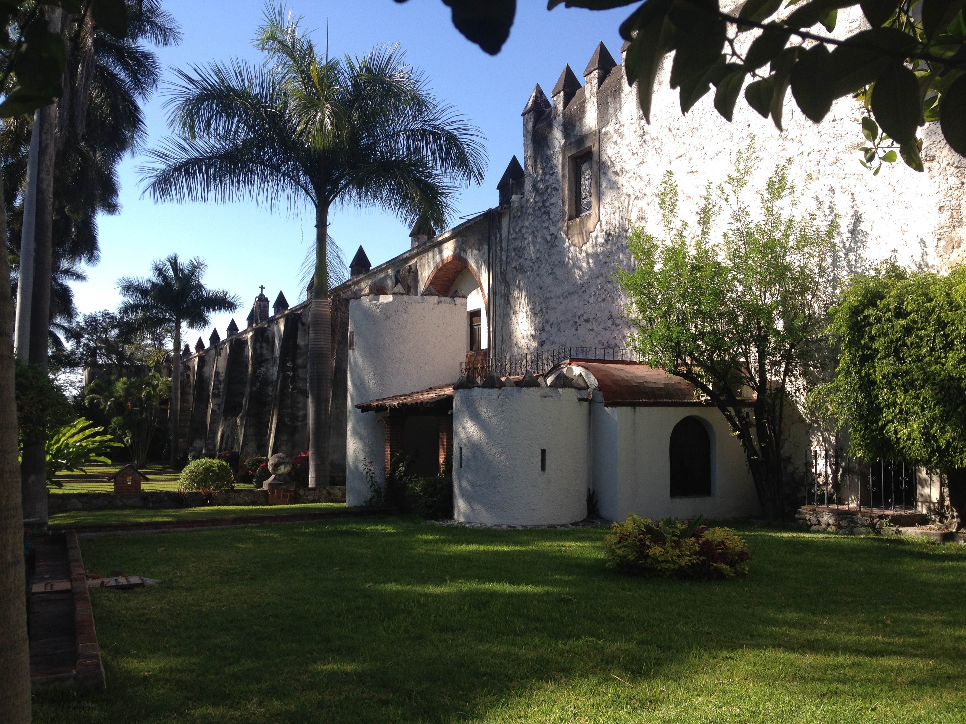 área principal, patio con áreas verdes a la entrada en la Hacienda Vista Hermosa, Tequesquitengo, Morelos. México